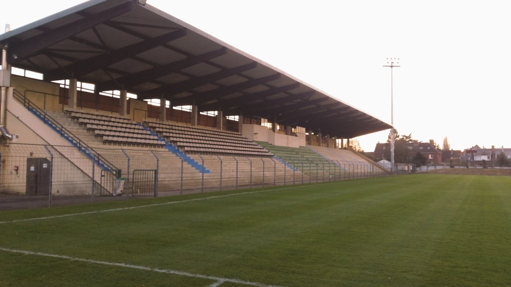 stade après un petit lifting pour accueillir Orléans et Béziers en championnat National